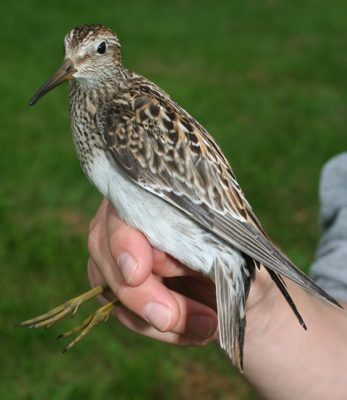 Mekszikópusztán (Győr-Moson-Sopron megye) gyűrűzött fiatal vándor partfutó